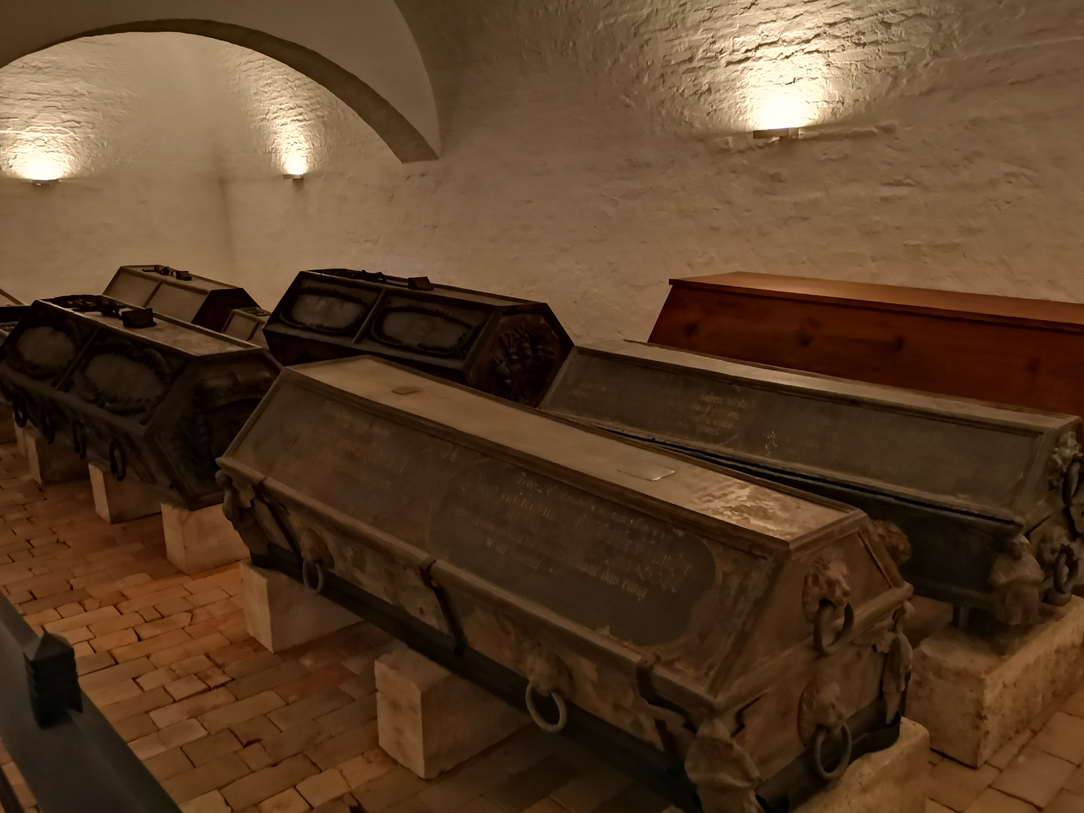 Fürstengruft Weimar; Särge von Herzog Wilhelm IV. (1598–1662), Herzogin Eleonora Dorothea (1602–1664), Unbekannter Fürst des 17./18. Jahrhunderts (vorn von links nach rechts); (dahinter von links nach rechts) Herzogin Christiana Elisabetha (1638–1679), Herzog Johann Ernst II (1627–1683); dahinter Kindersarg von Prinzessin Johanna Augusta (1690–1691); hinten: Herzog Johann Ernst III. (1664–1707)